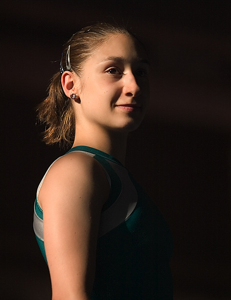 Sara Moro en su último entrenamiento en el CAR de Madrid en 2004.